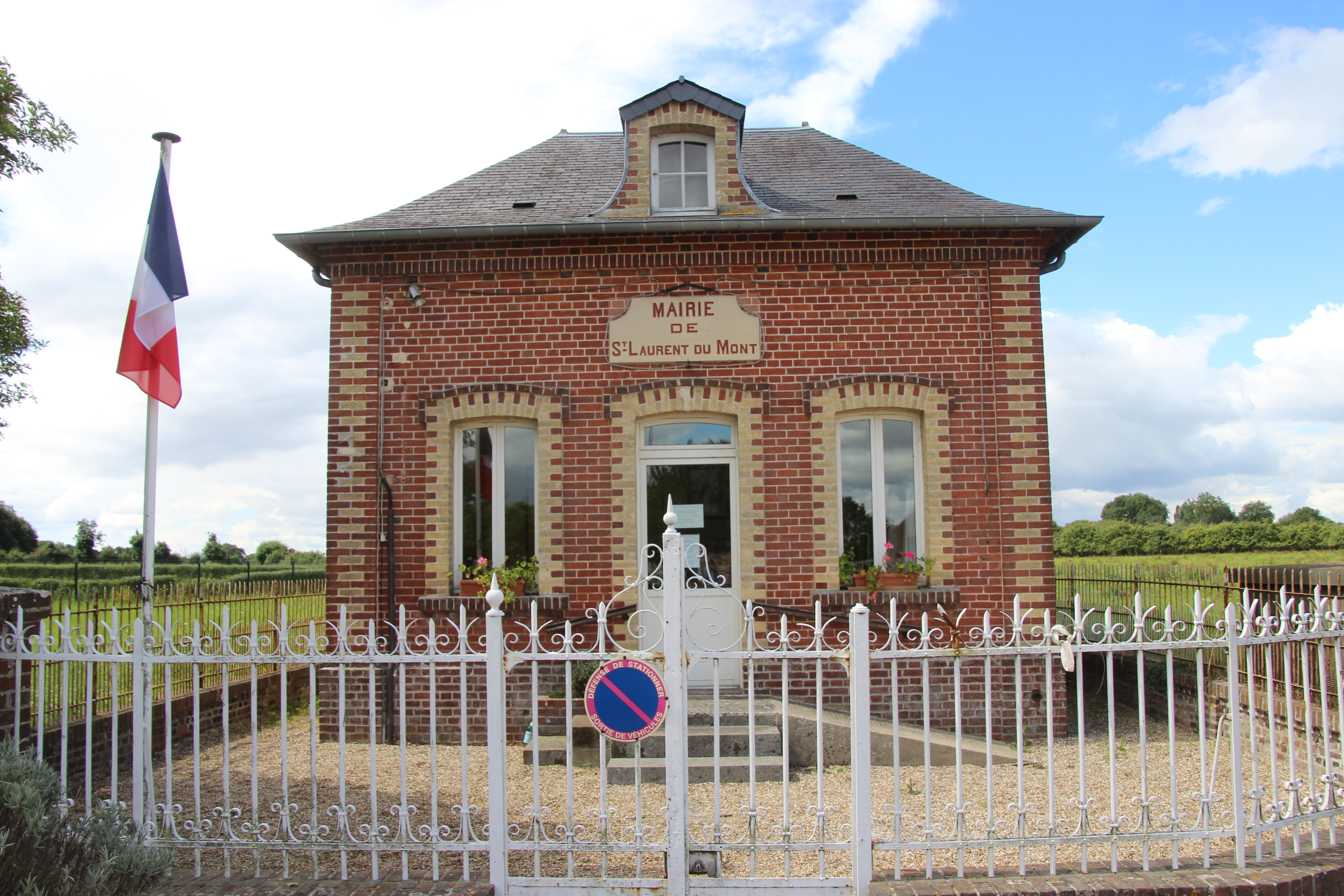 Mairie Saint-Laurent-du-Mont